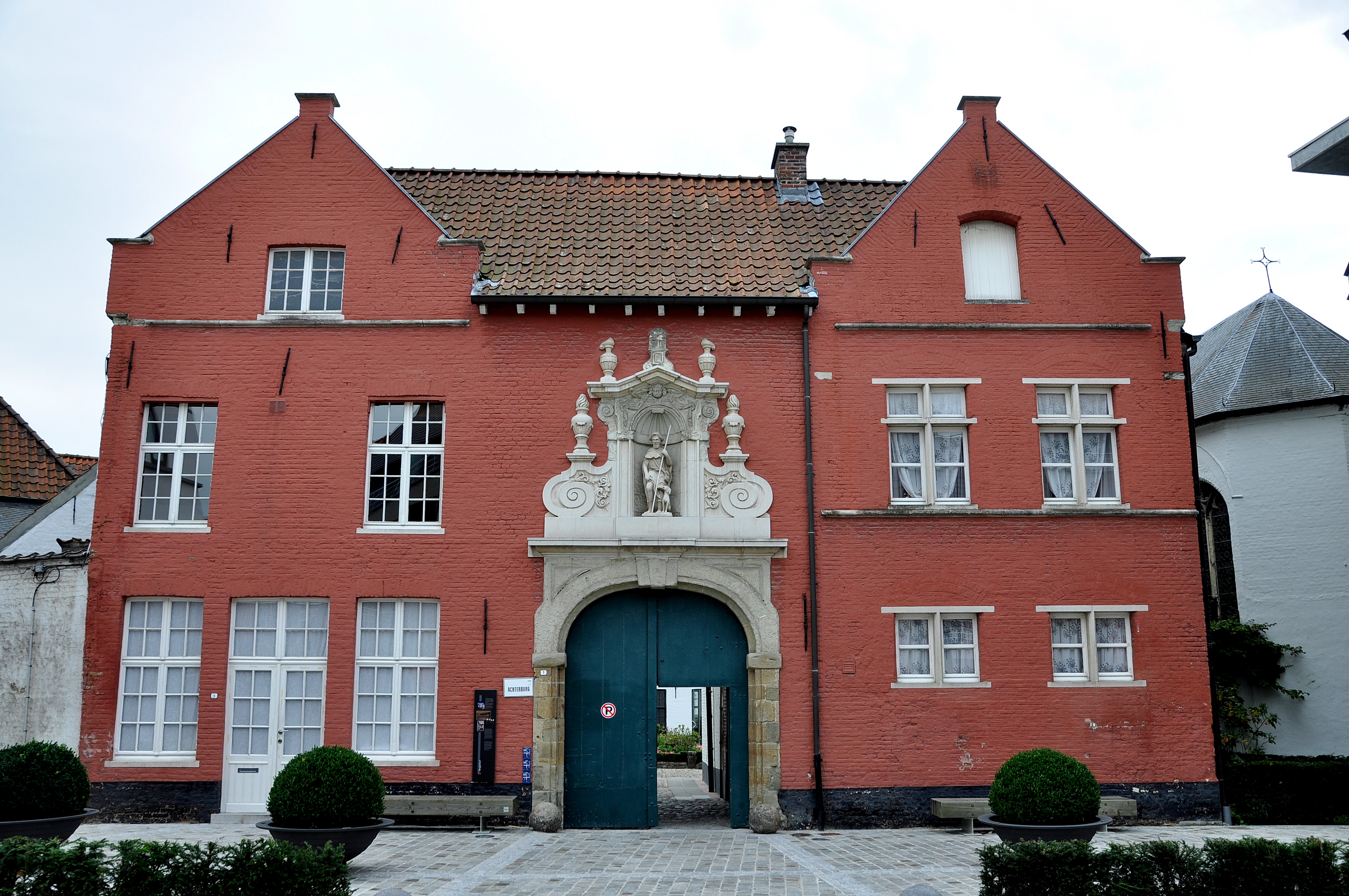 Het begijnhof van Oudenaarde